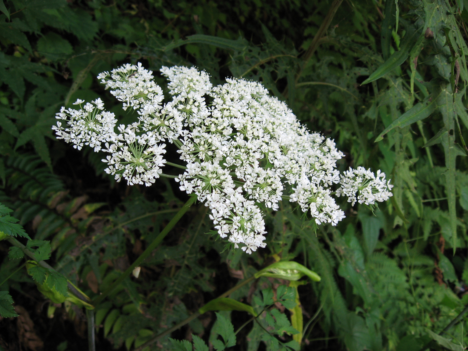 シラネセンキュウ